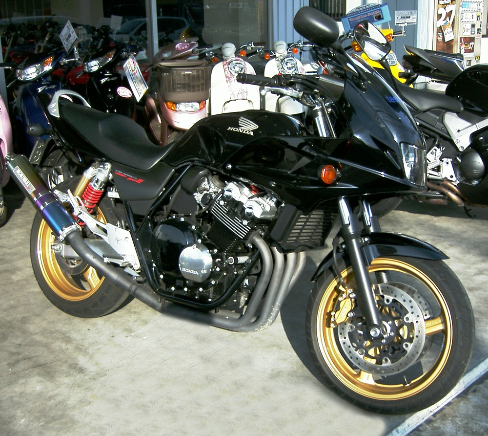 Honda_CB400_SUPER_BOL_D'OR Japan